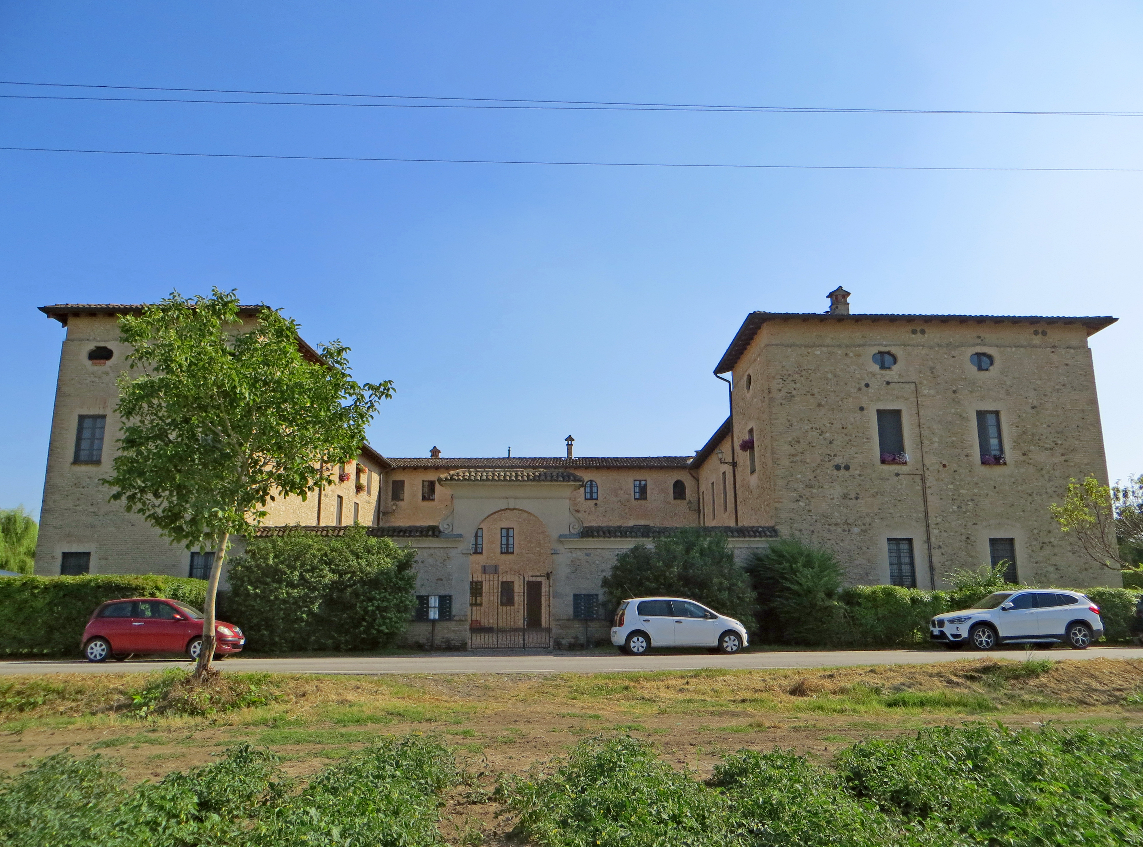 Corte dei Torrioni (Madregolo, Collecchio) - facciata